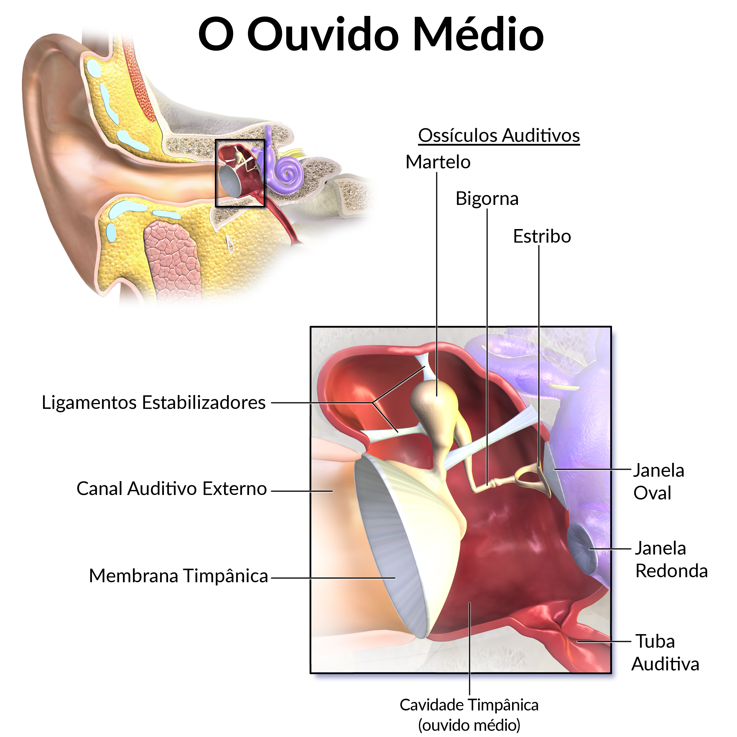 Anatomia da orelha, com destaque para as estruturas do ouvido médio.